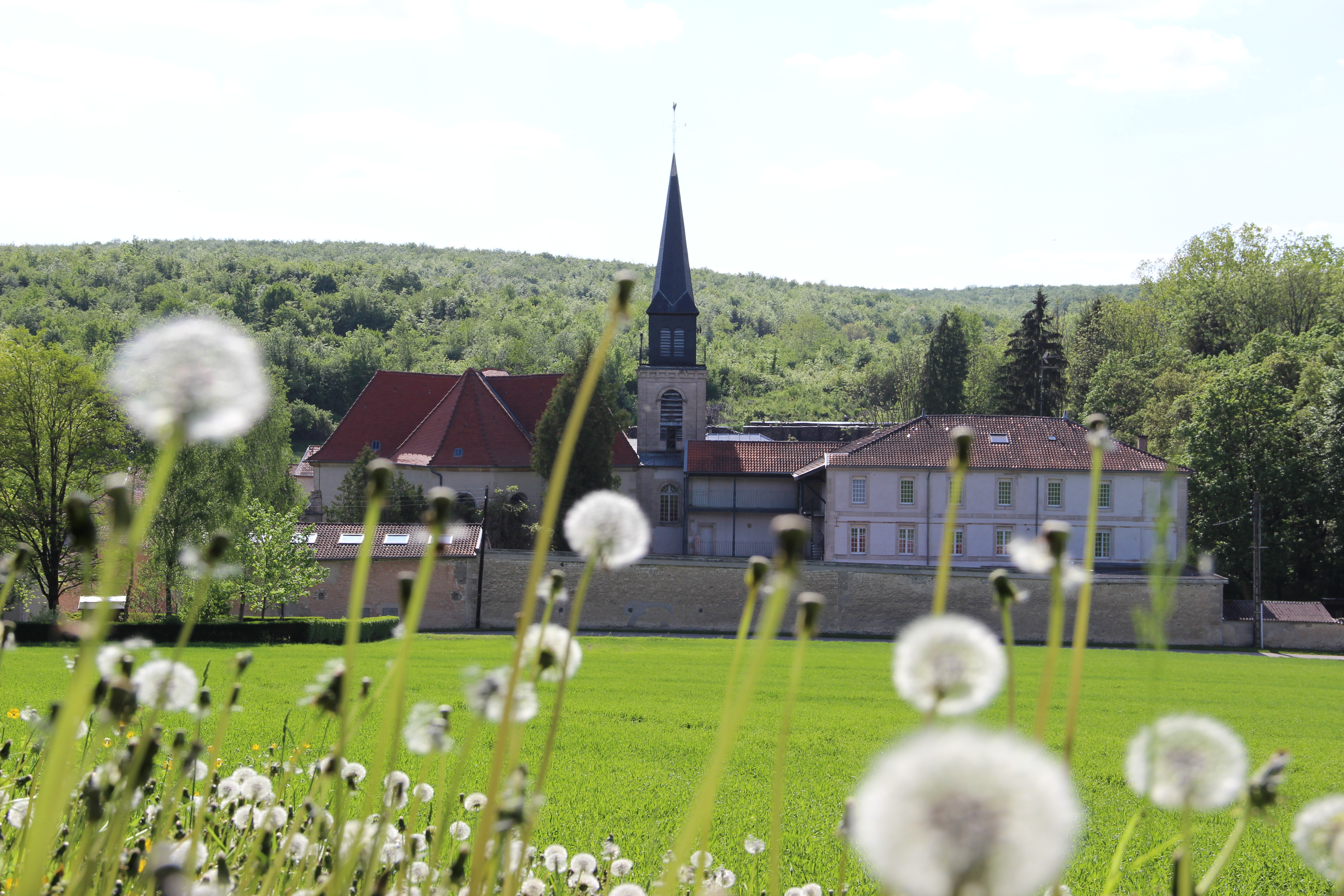 Notre-Dame de Benoite-Vaux